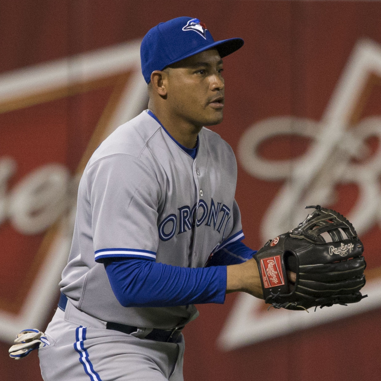 Ezequiel Carrera